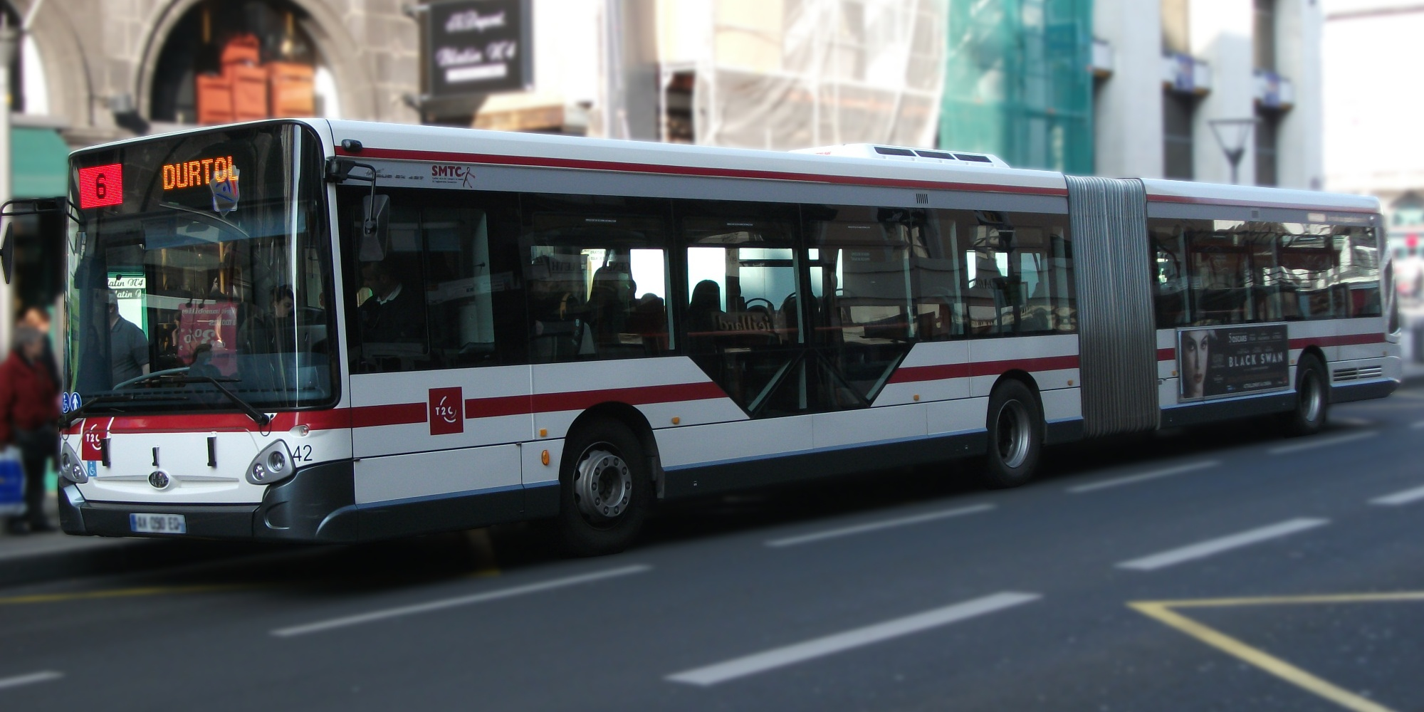 Heuliez GX 427 sur la ligne 6 en direction de Durtol, Clermont-Ferrand, Puy-de-Dôme, France. Réseau T2C, arrêt Jaude